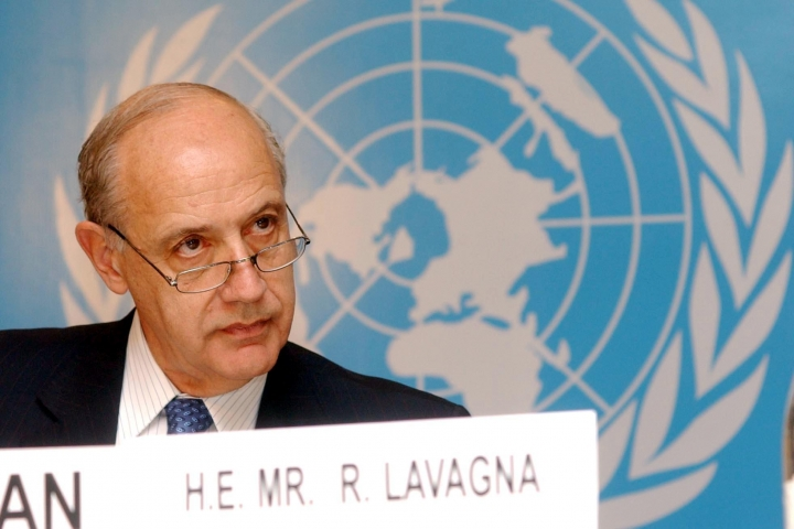 São Paulo - Ministro da Economia da Argentina, Roberto Lavagna, durante reunião do Comitê de Participantes do Sistema Global de Preferências Comerciais em Desenvolvimento, na Unctad (Foto Rose Brasil - ABr)